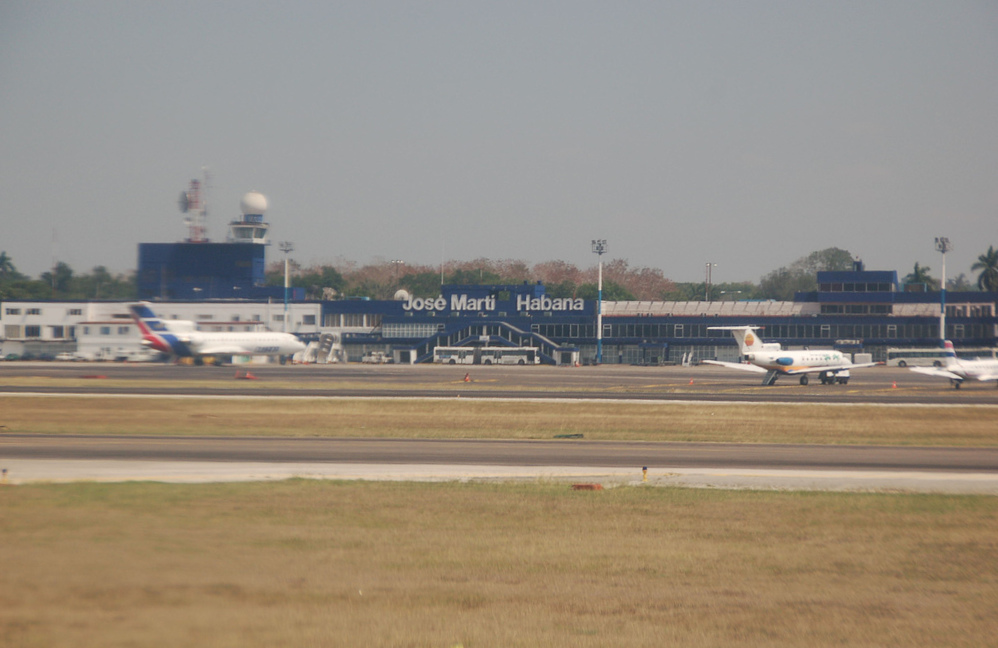 Havana Airport- Domestic terminal